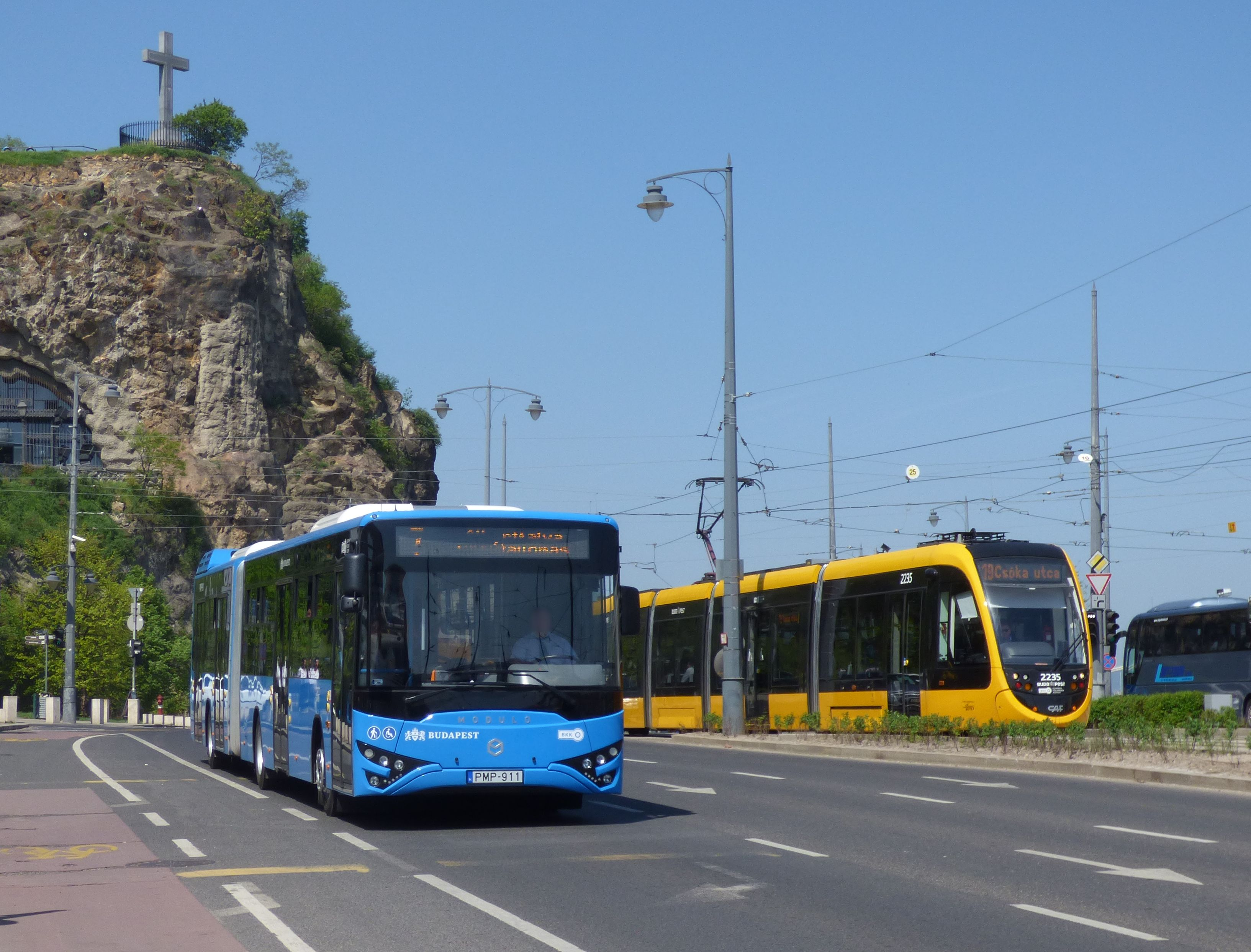 7-es jelzésű Modulo M168d busz (frsz. PMP-911) és 19-es jelzésű CAF Urbos 3 villamos (psz. 2235) a Szent Gellért téren